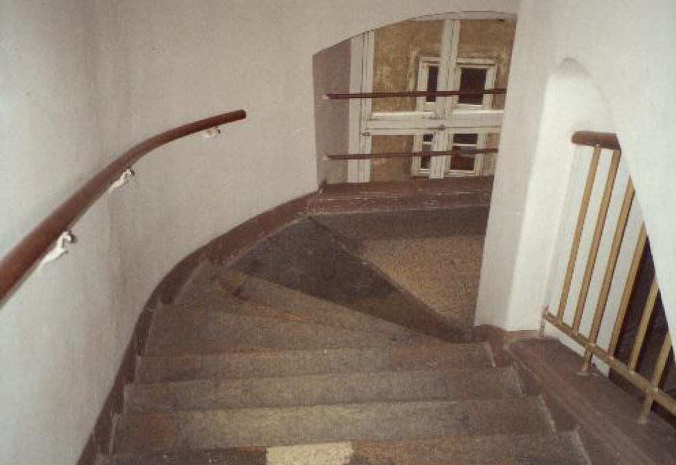 Wohnhaus Hoher Markt 5, ehem. Schranne Stadt- und Landgericht. Kaisersteinstiege